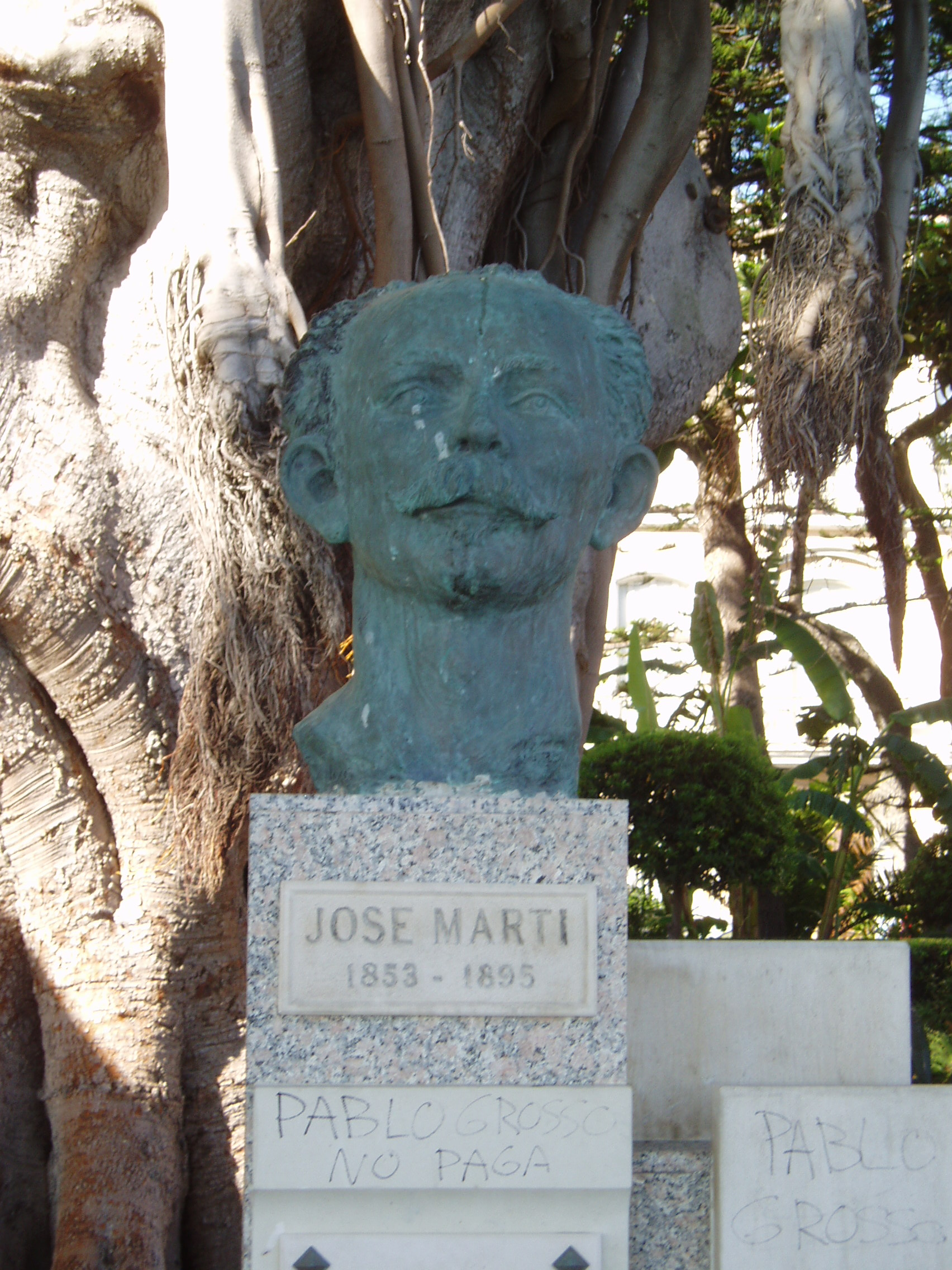 Busto del dirigente cubano José Martí situado en la Alameda Apodaca de Cádiz, España.